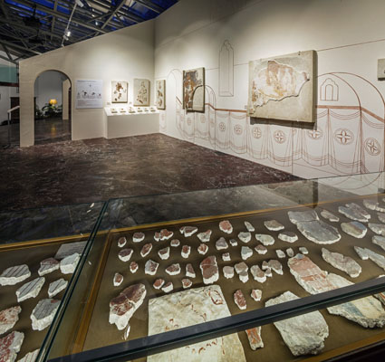 Выставка "Стенное письмо строения великих князей Тверских" в Музее русской иконы. Фрески XV в.